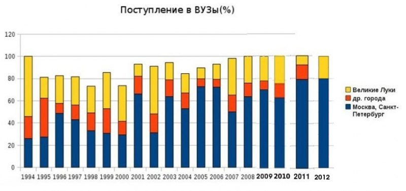 Статистика поступления в ВУЗы